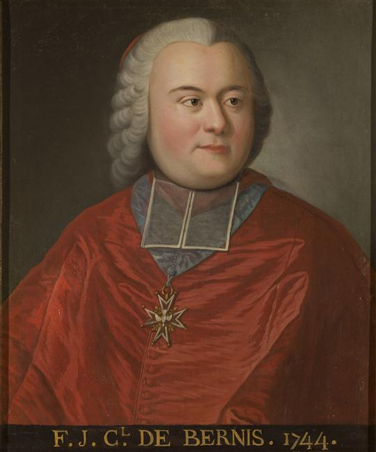 il porte la croix de l'ordre du Saint-Esprit